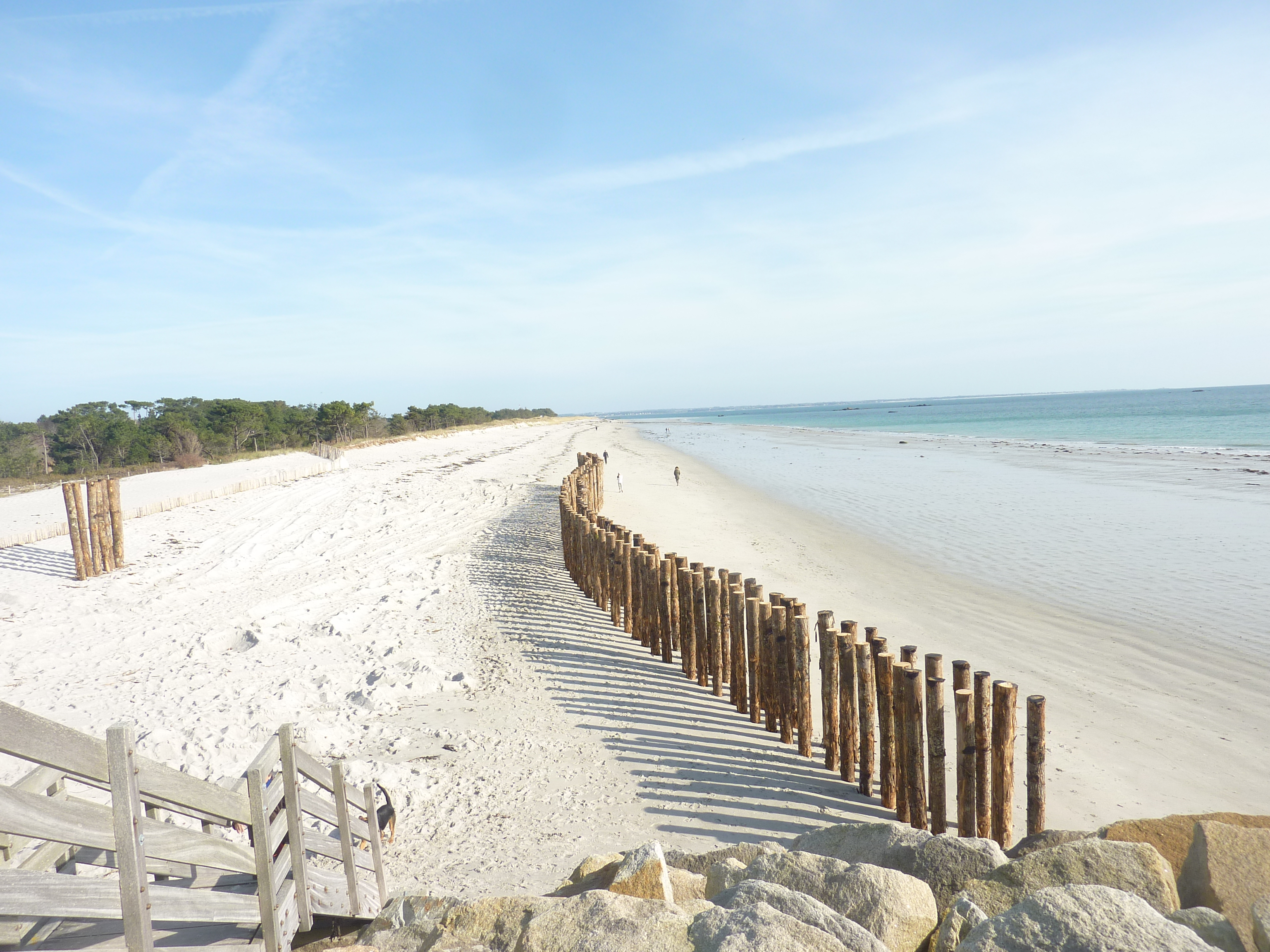 Fouesnant (Cleut Rouz) : pieux plantés dans le sable pour tenter de ralentir l'érosion de la dune à l'extrémité du cordon d'enrochement